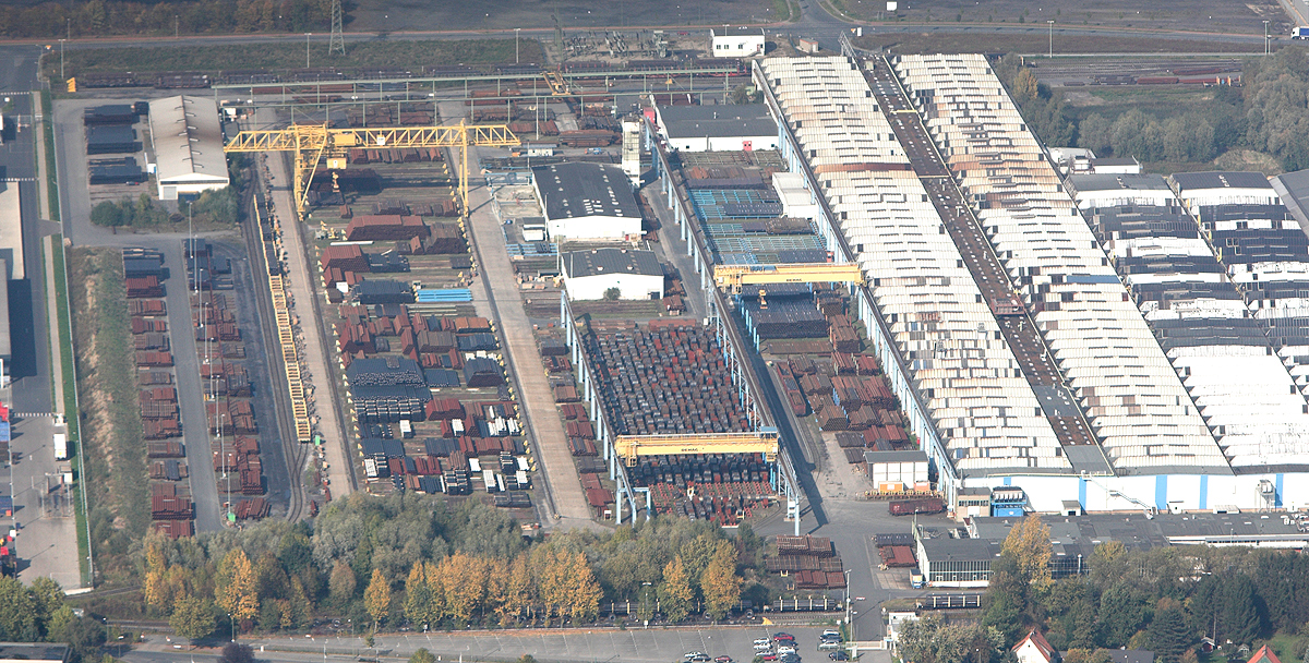 Luftbildaufnahme Hamm